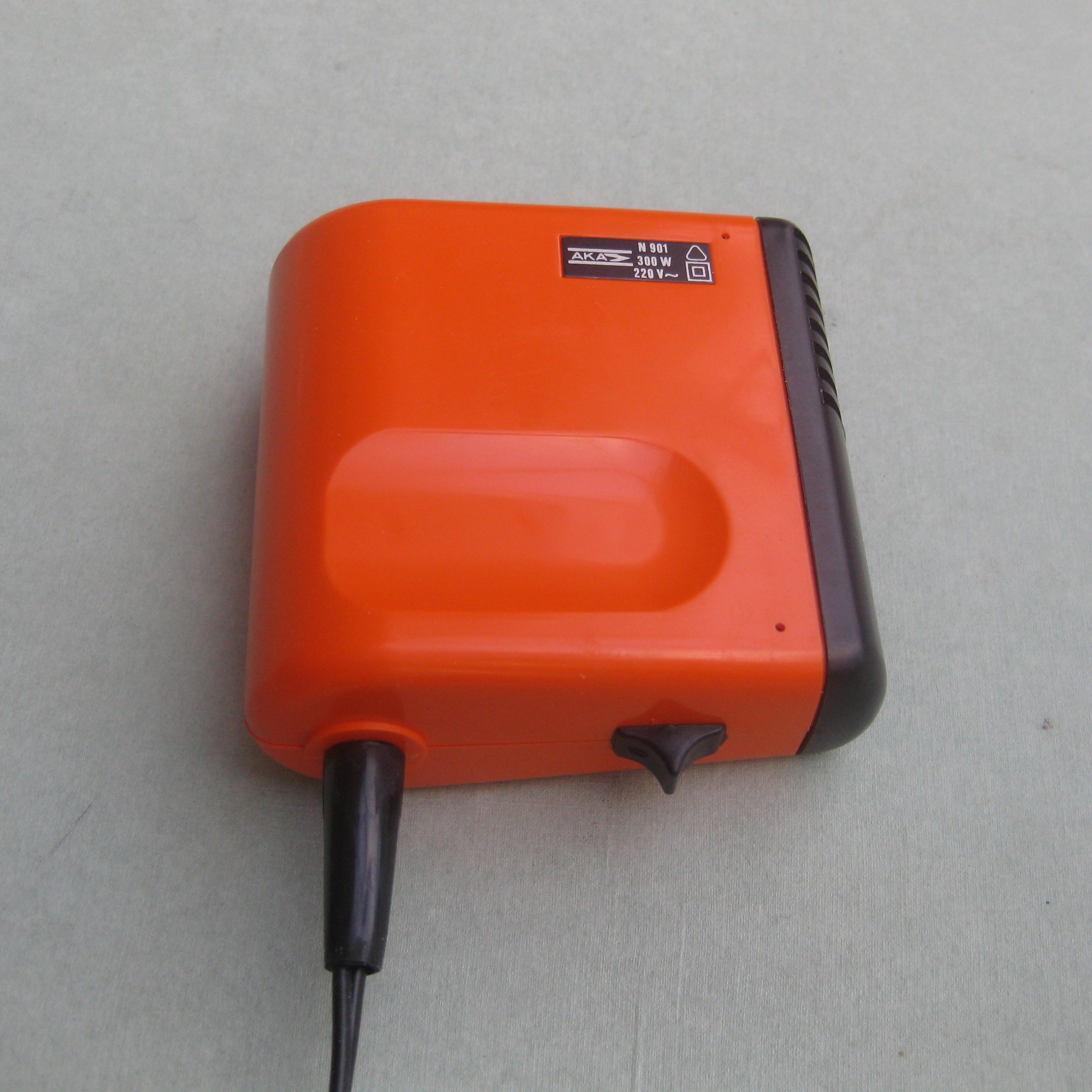 Reise-Luftdusche AKA "N 901", Design: Doris und Henryk Sidor, 1975